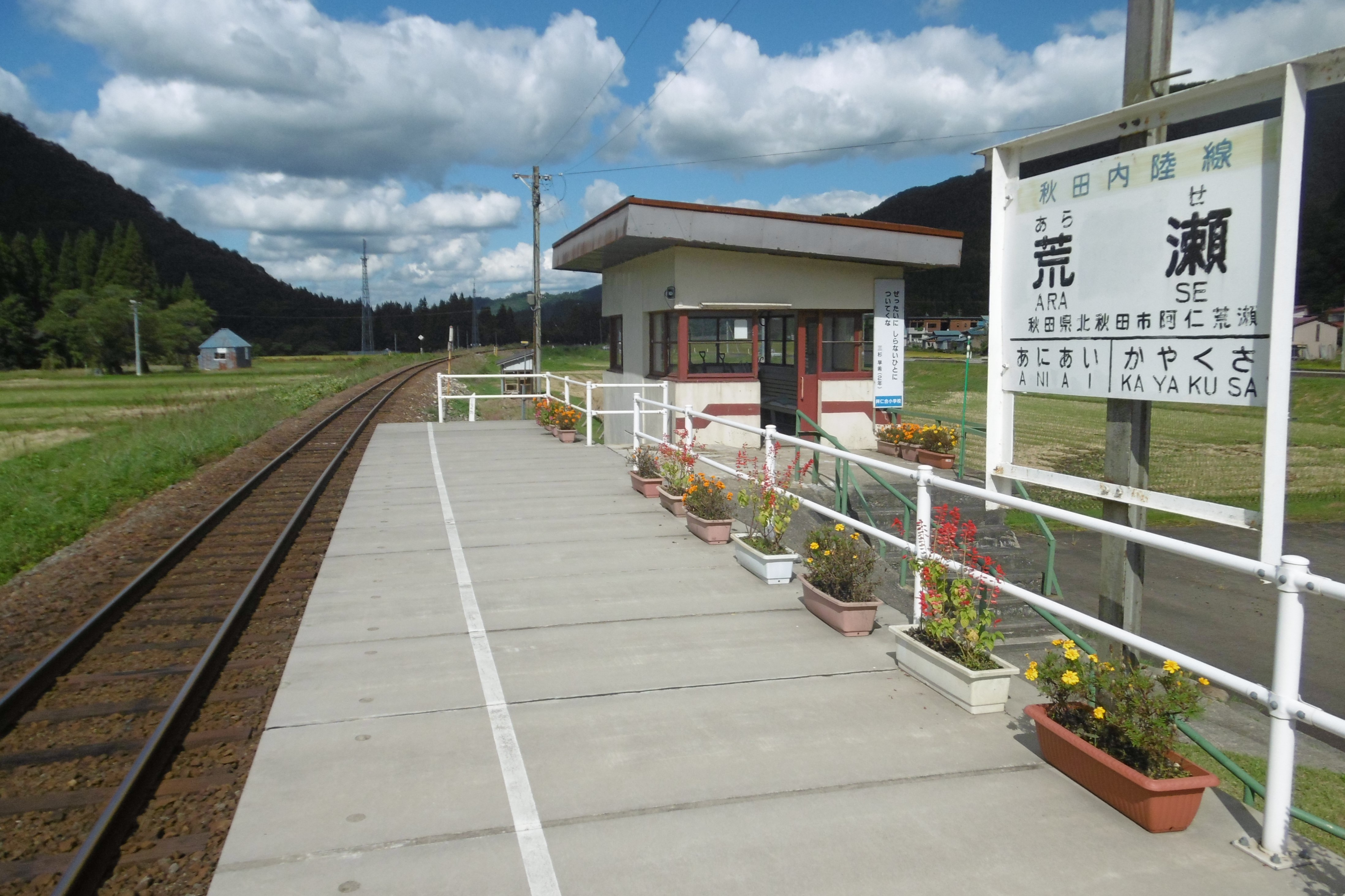 秋田内陸線・荒瀬駅